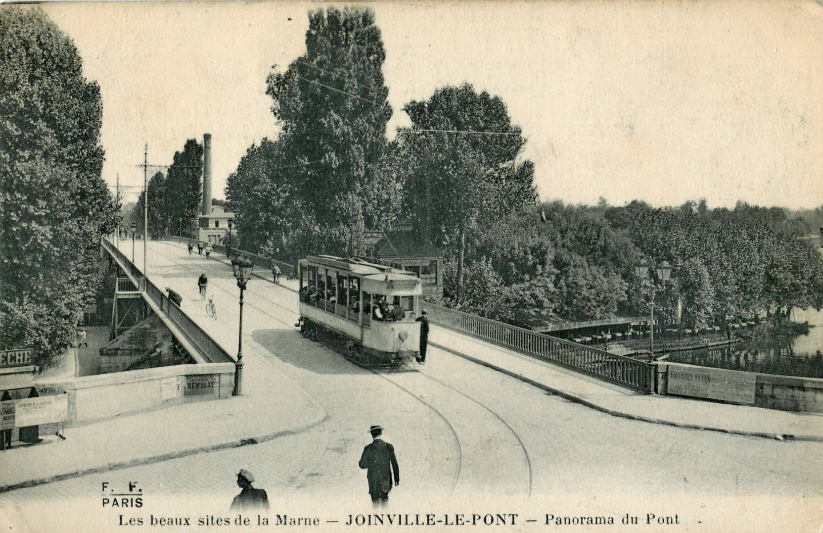 Carte postale ancienne éditée par FF à Paris, collection Les beaux sites de la Marne : JOINVILLE-LE-PONT - Panorama du Pont Vue d'un tramway de la ligne 10 (Porte de Vincennes – Champigny-gare) de la Compagnie des tramways de l'Est parisien